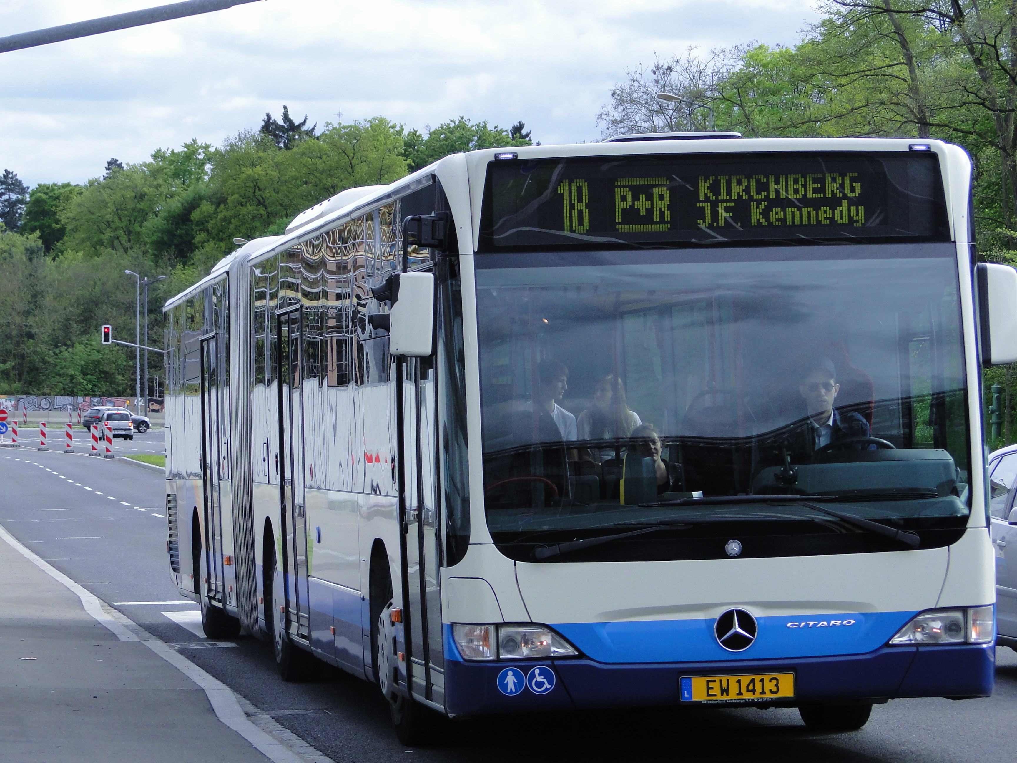 Bus WEBER fir d'AVL (Autobus de la Ville de Luxembourg) #795 (EW 1413). Marque: Mercedes Fiert um Kirchbierg, Bd Konrad Adenauer op der Linn 18 Richtung John F. Kennedy.